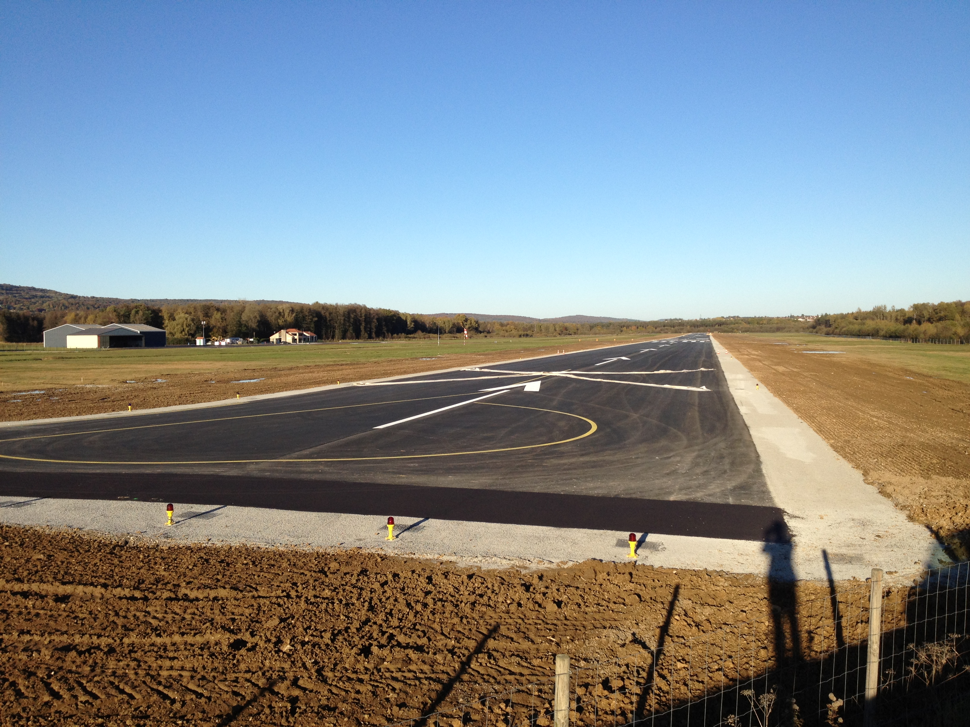 Fin des travaux de rénovation à l'aérodrome de Besançon - La Vèze : marquage et balises lumineuses installées ; système PAPI non installé.